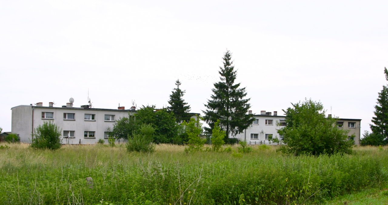 Rozkochów (dodatkowa nazwa w j. niem. Rosnochau) – wieś w Polsce położona w województwie opolskim, w powiecie krapkowickim, w gminie Walce..